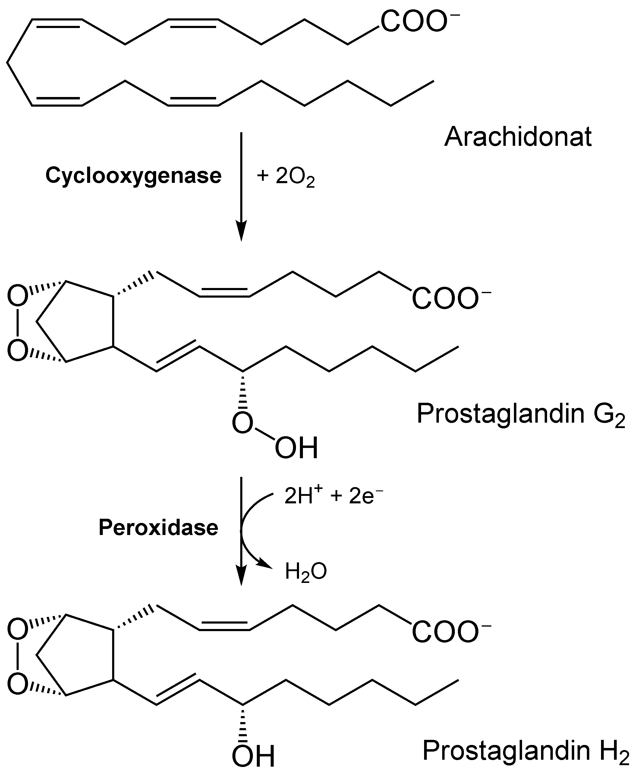 Bildung des Prostaglandins H2